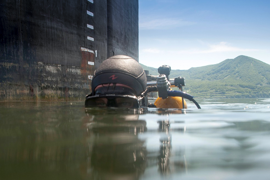 На Камчатке 311-й отряд по борьбе с подводными диверсионными силами и средствами отмечает свой профессиональный праздник.